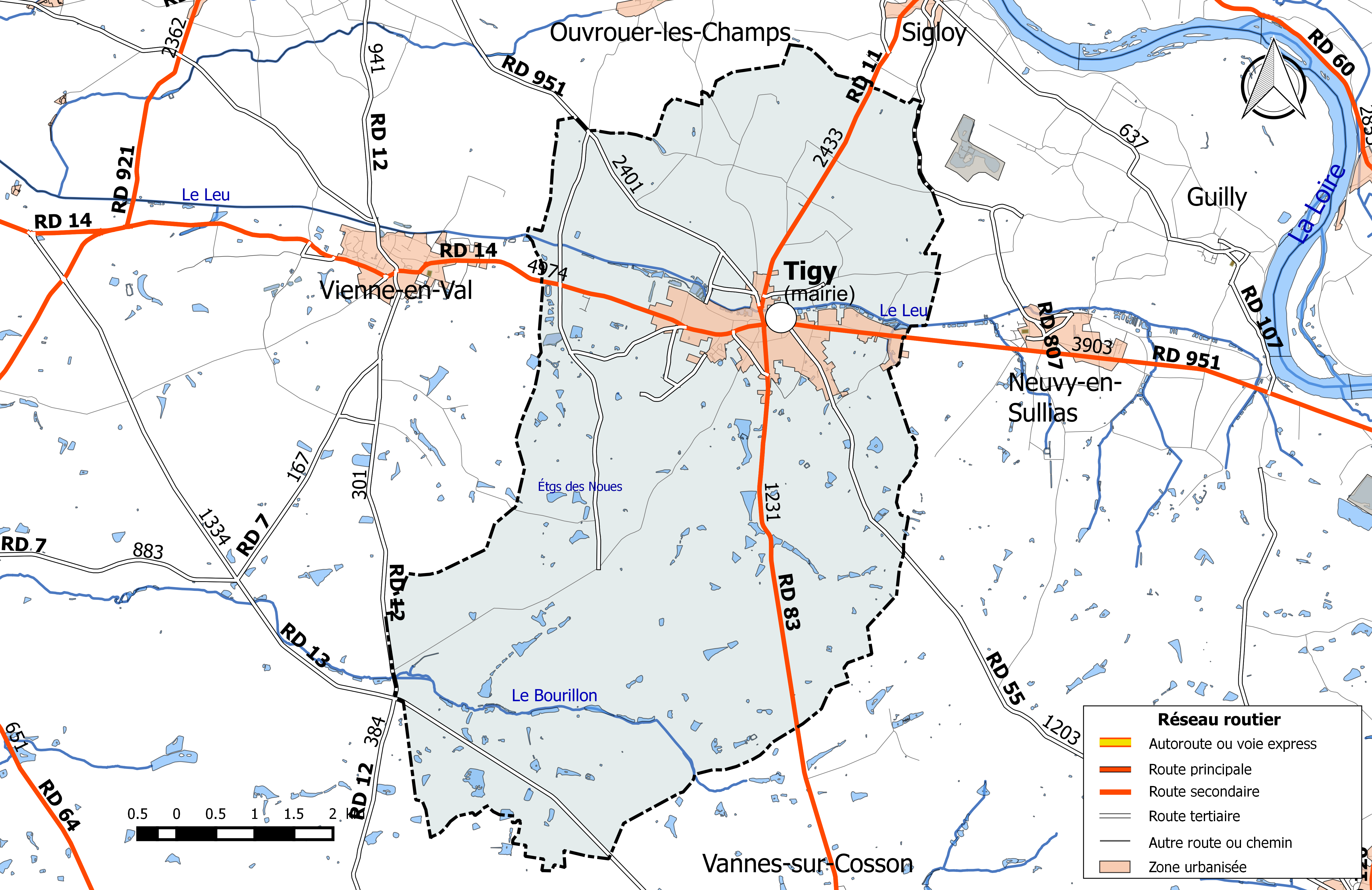 Carte du réseau routier de la commune de Tigy.